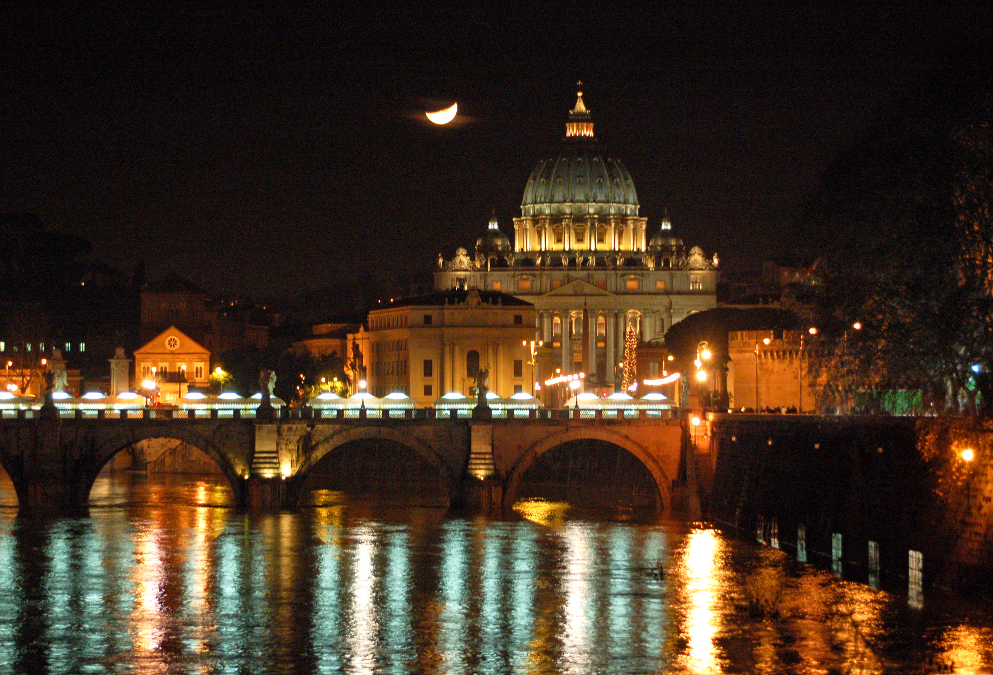 La Basilica di San Pietro e Ponte Sant'Angelo - Vista notturna